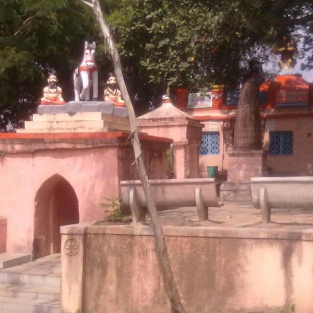 अडबलनाथ मंदिर